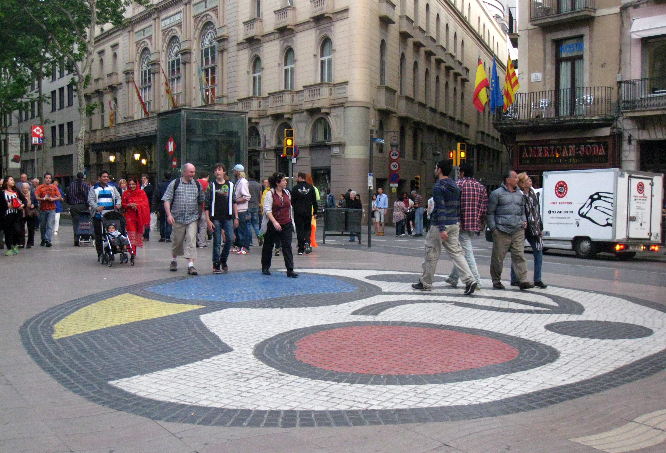 Paviment Miró. La Rambla. Pla de la Boqueria (Barcelona)